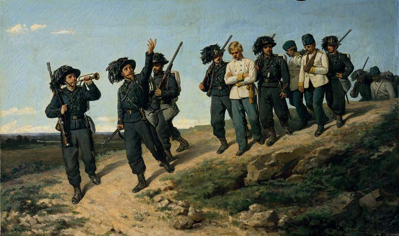 "Ritorno dei bersaglieri italiani da una ricognizione"